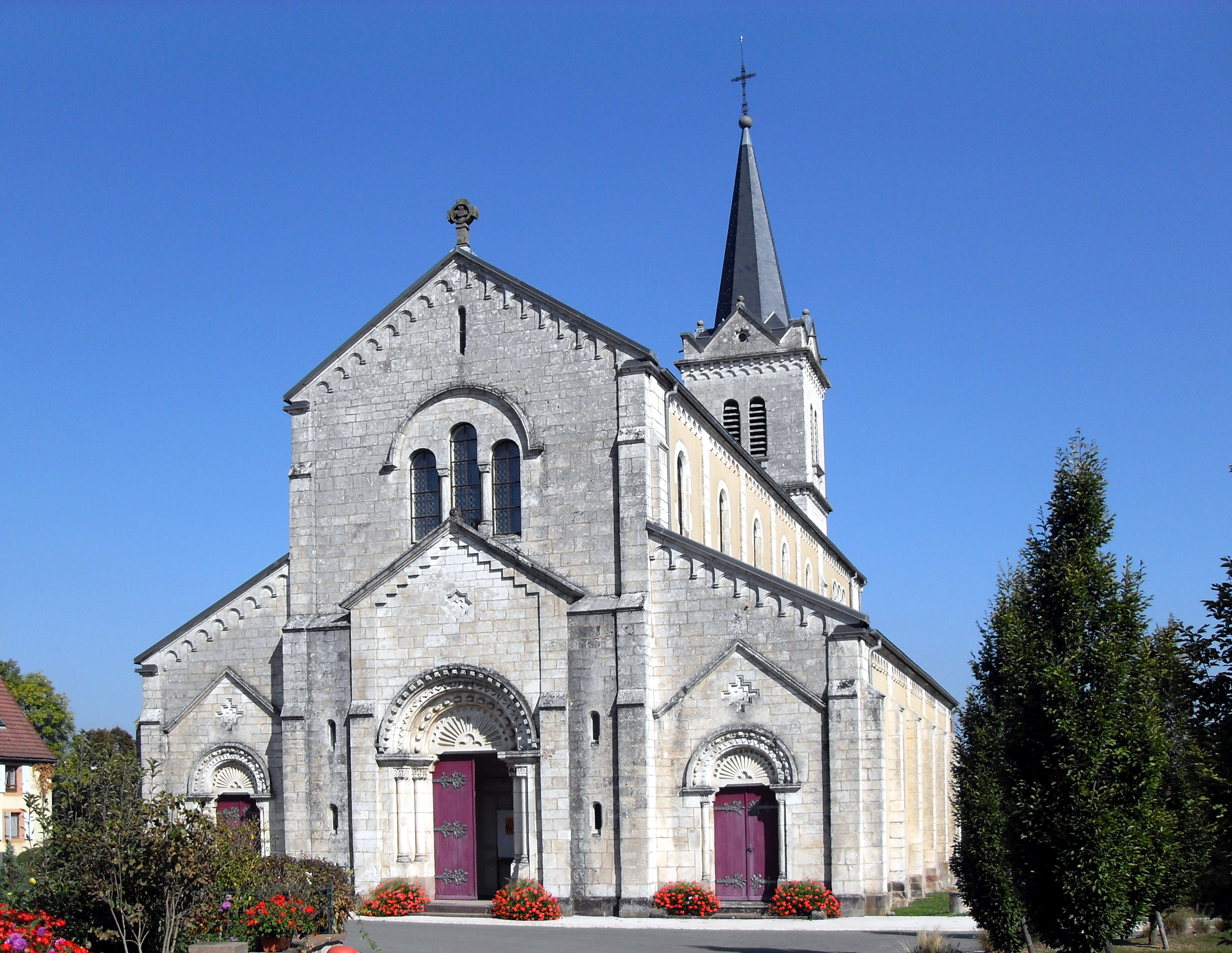 L'église Saint-Laurent à Bermont